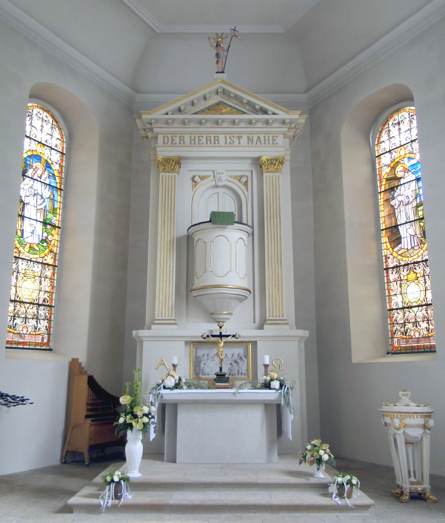 Altar der Schifferkirche Maria am Wasser